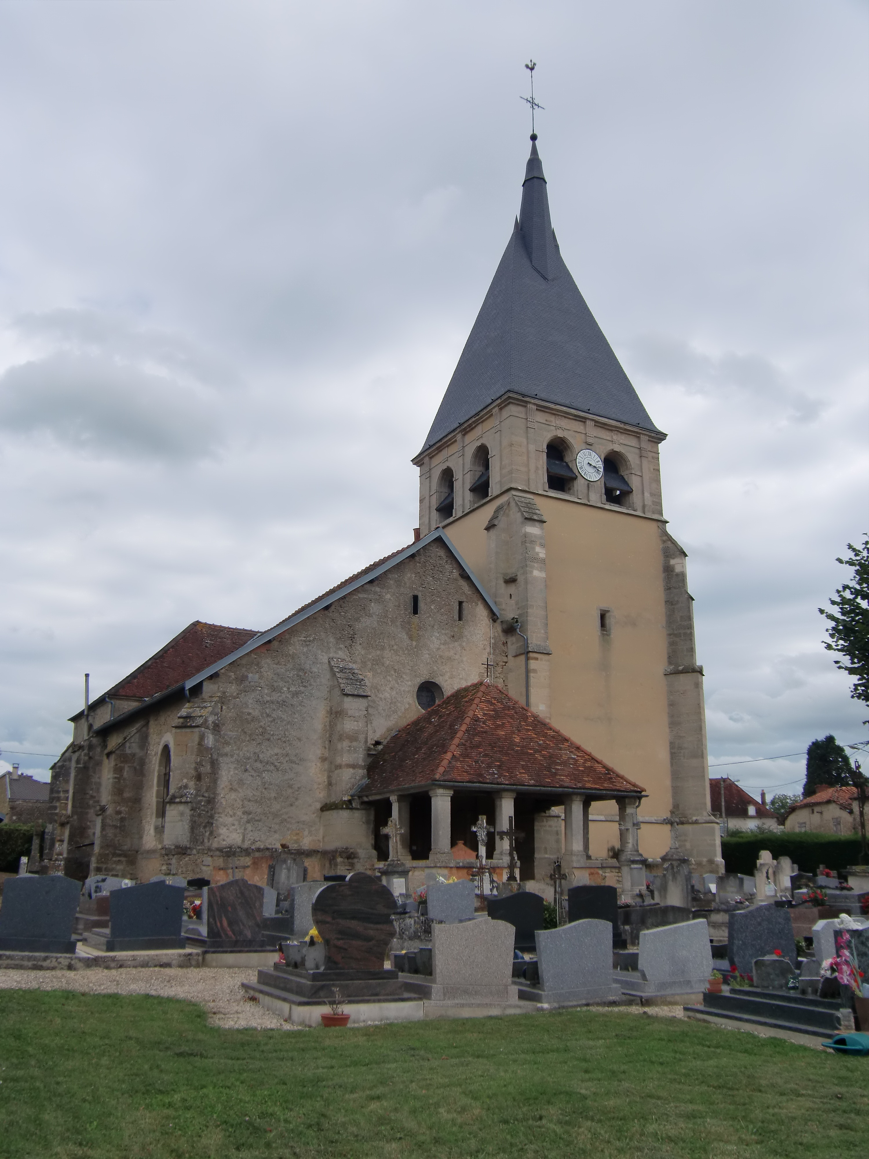 Eglise de Ville-sur-Terre (Aube, Champagne, France)